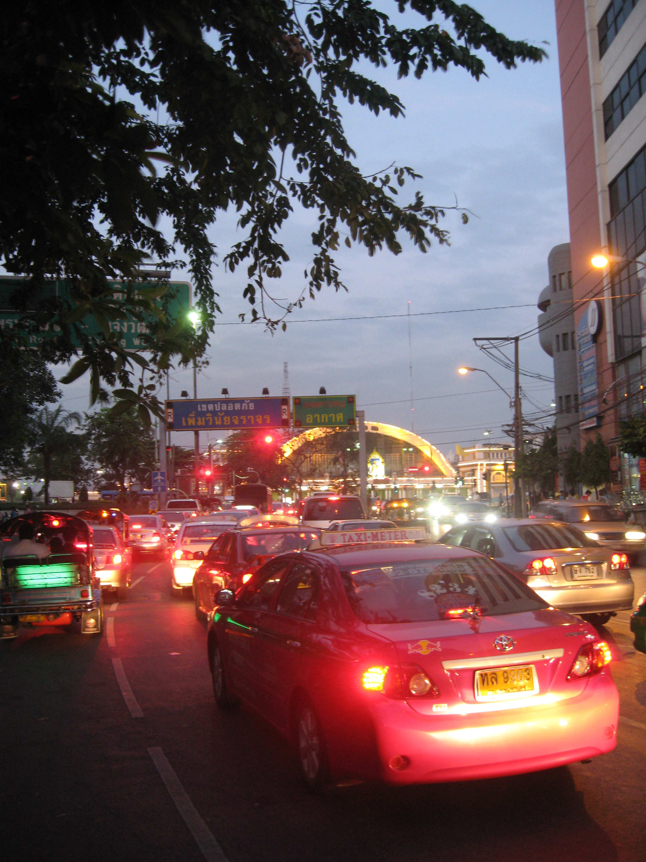 ถนนในกรุงเทพ